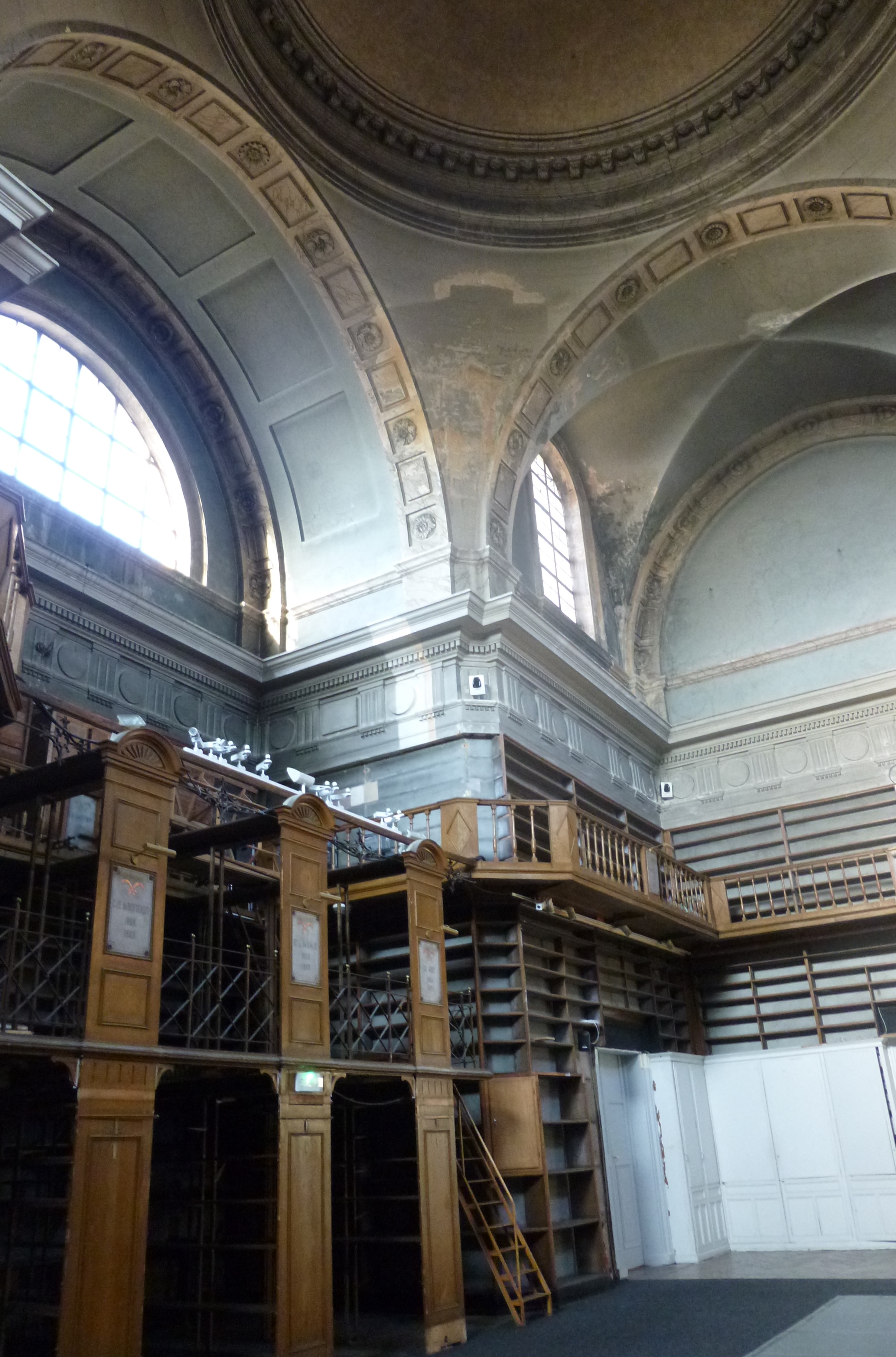 Intérieur de la chapelle des Carmes à Metz (musée de la Cour d'Or), présentant des anciens étalages bibliothécaires.